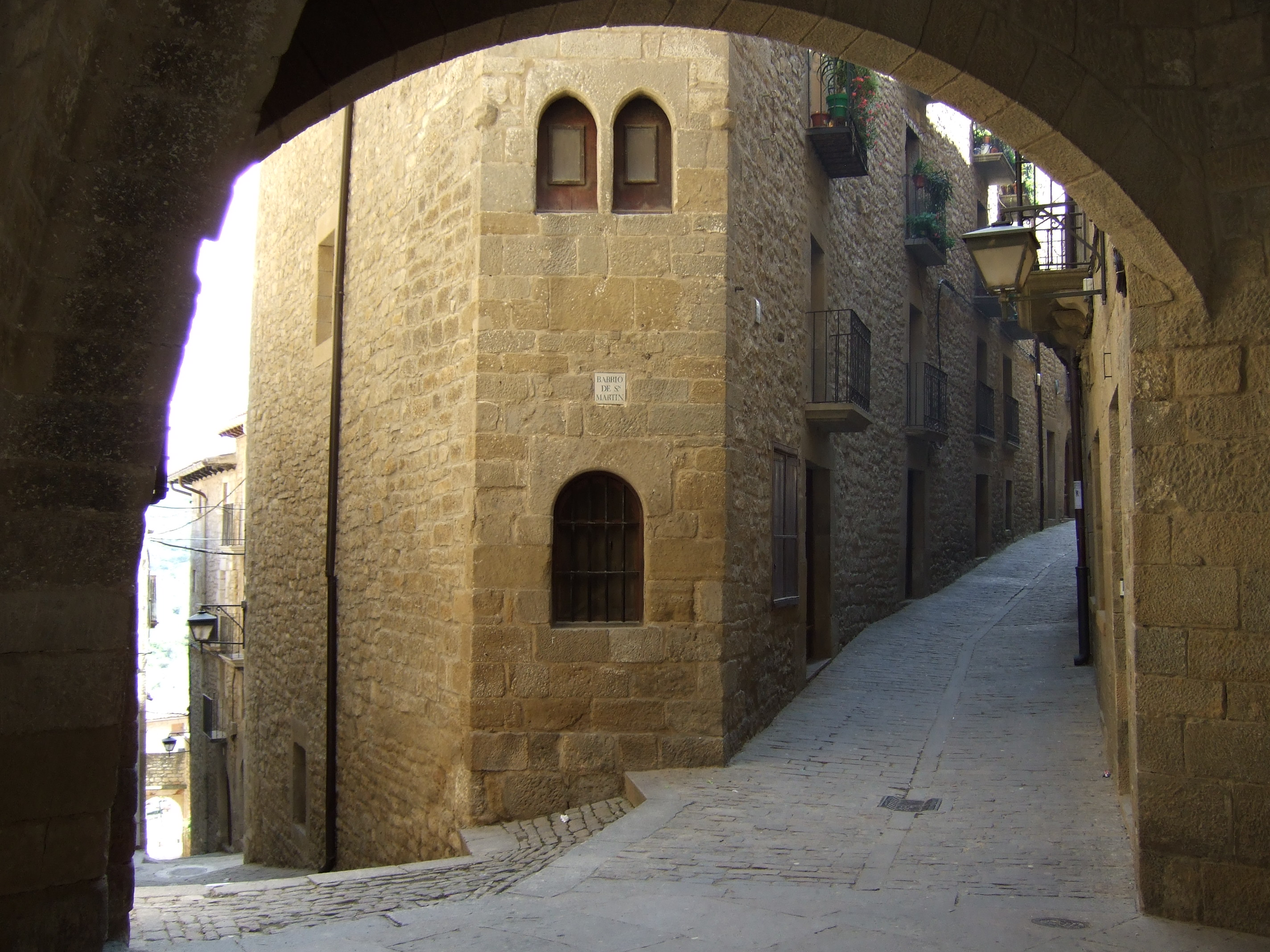 Sos del Rey Católico